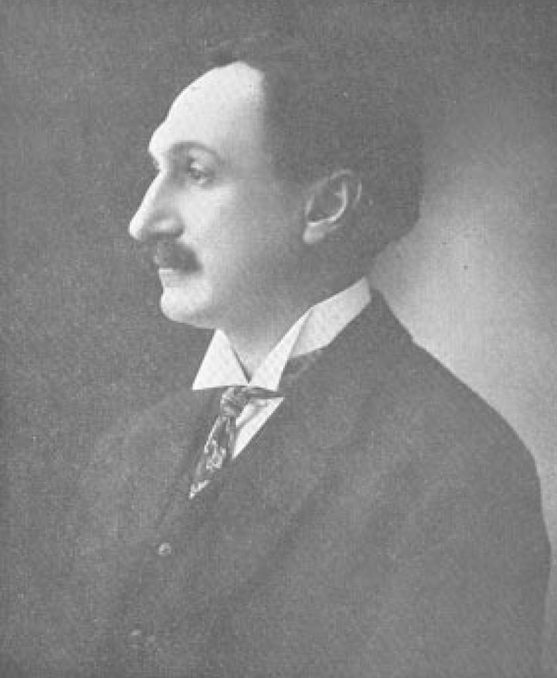 Máximo Soto Hall, escritor guatemalteco. Medio hermano del presidente hondureño Marco Aurelio Soto.